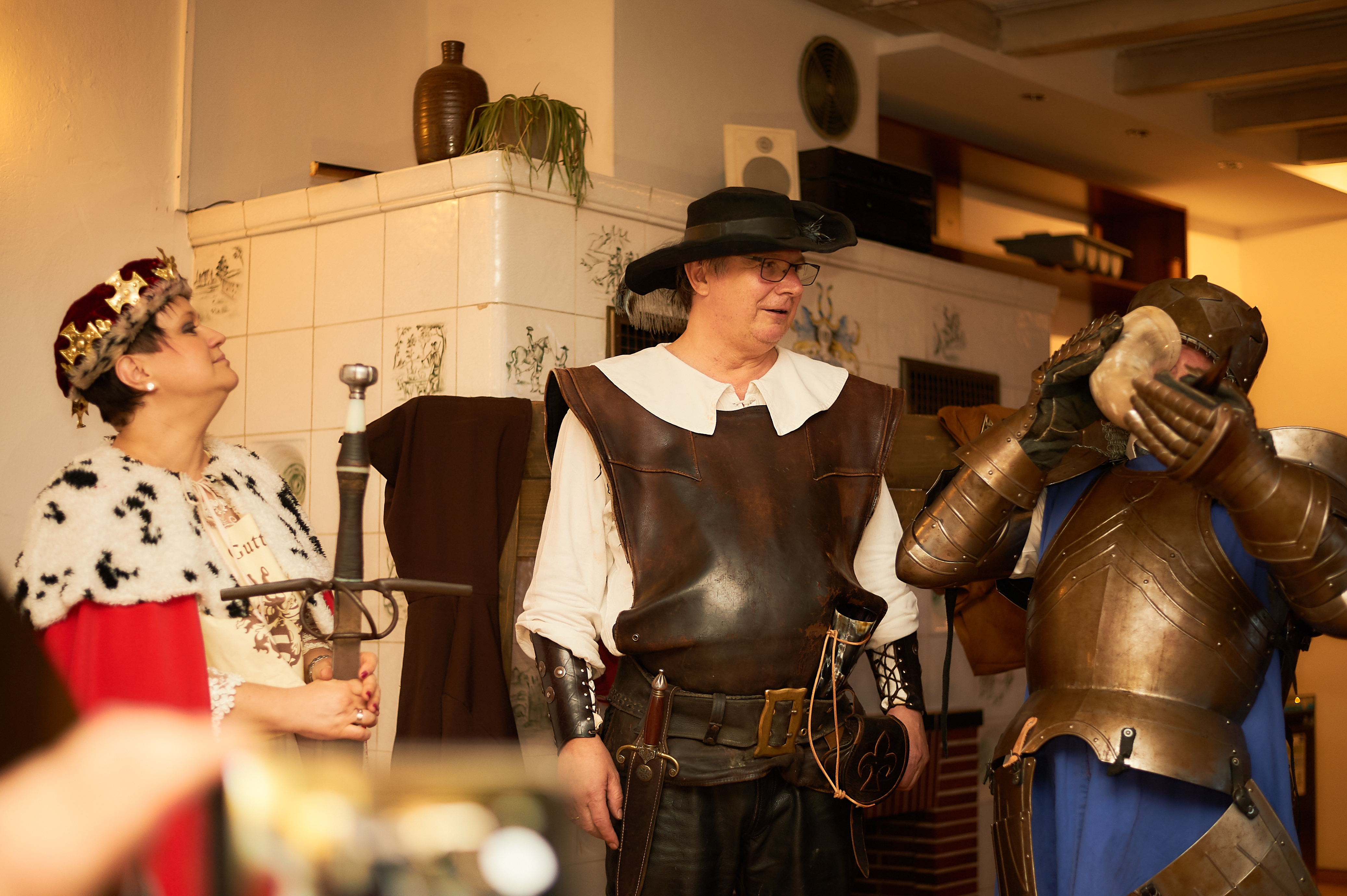 Rittermahl - Das ritterliche Abendessen